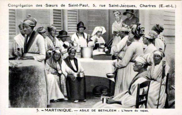 Repas servi par les sœurs de la congrégation de St Paul de Chartres aux vieillards de l'asile Bethléem à Saint-Pierre de la Martinique (avant 1874).